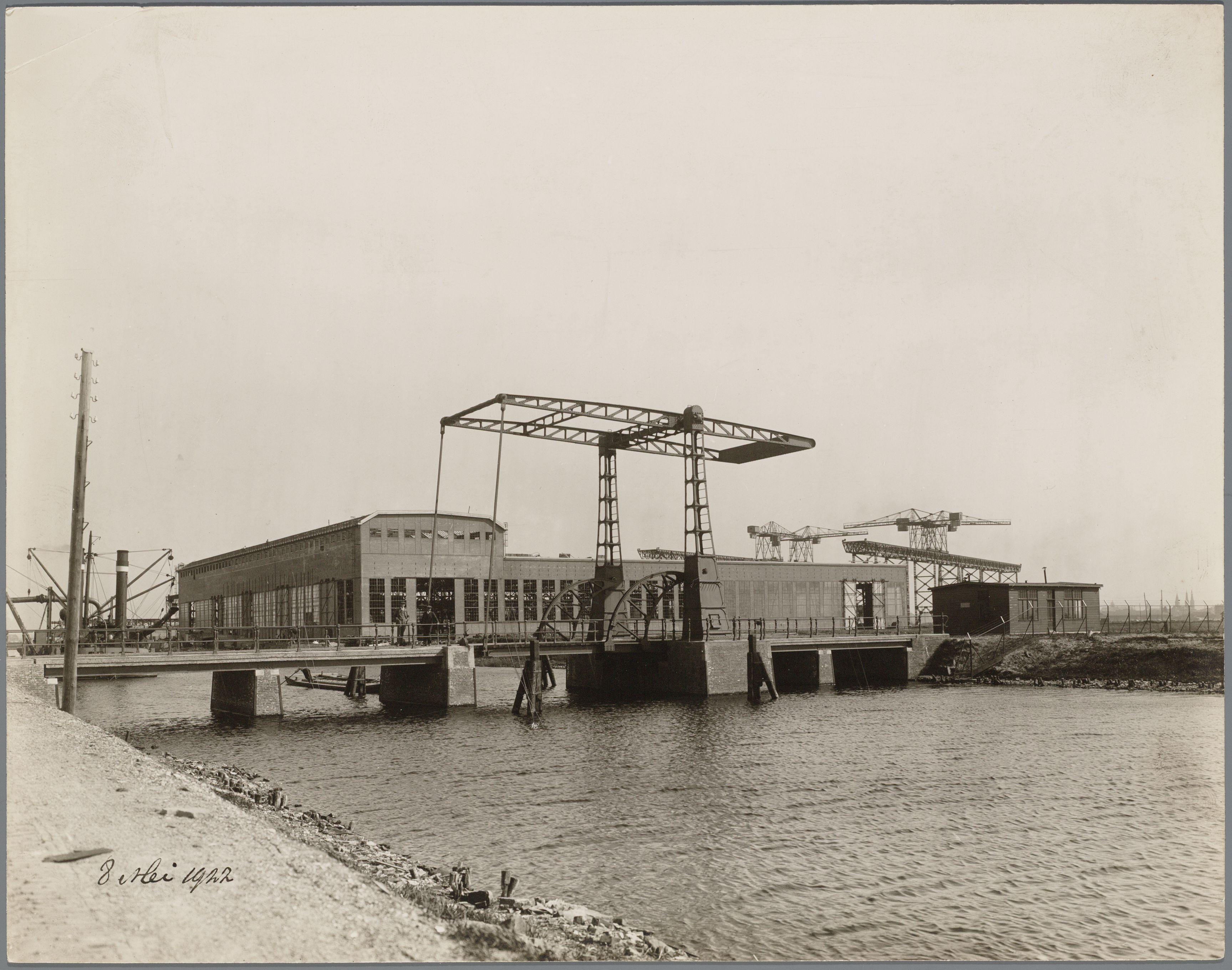 Beschrijving Gezicht op de nieuwe werf vanaf het Cornelis Douweskanaal De nieuwe N.S.M.-werf aan de overkant van het IJ met adres Cornelis Douwesweg 1 werd op 6 oktober 1922 in gebruik genomen. Documenttype foto Vervaardiger Oosterhuis, Gustaaf (1858-1938) Collectie Archief Nederlandse Dok- en Scheepsbouw Mij.: foto's Datering 8 mei 1922 Geografische naam IJ Zijkanaal I Cornelis Douwesweg Inventarissen Afbeeldingsbestand 010179000307 Generated with Dememorixer